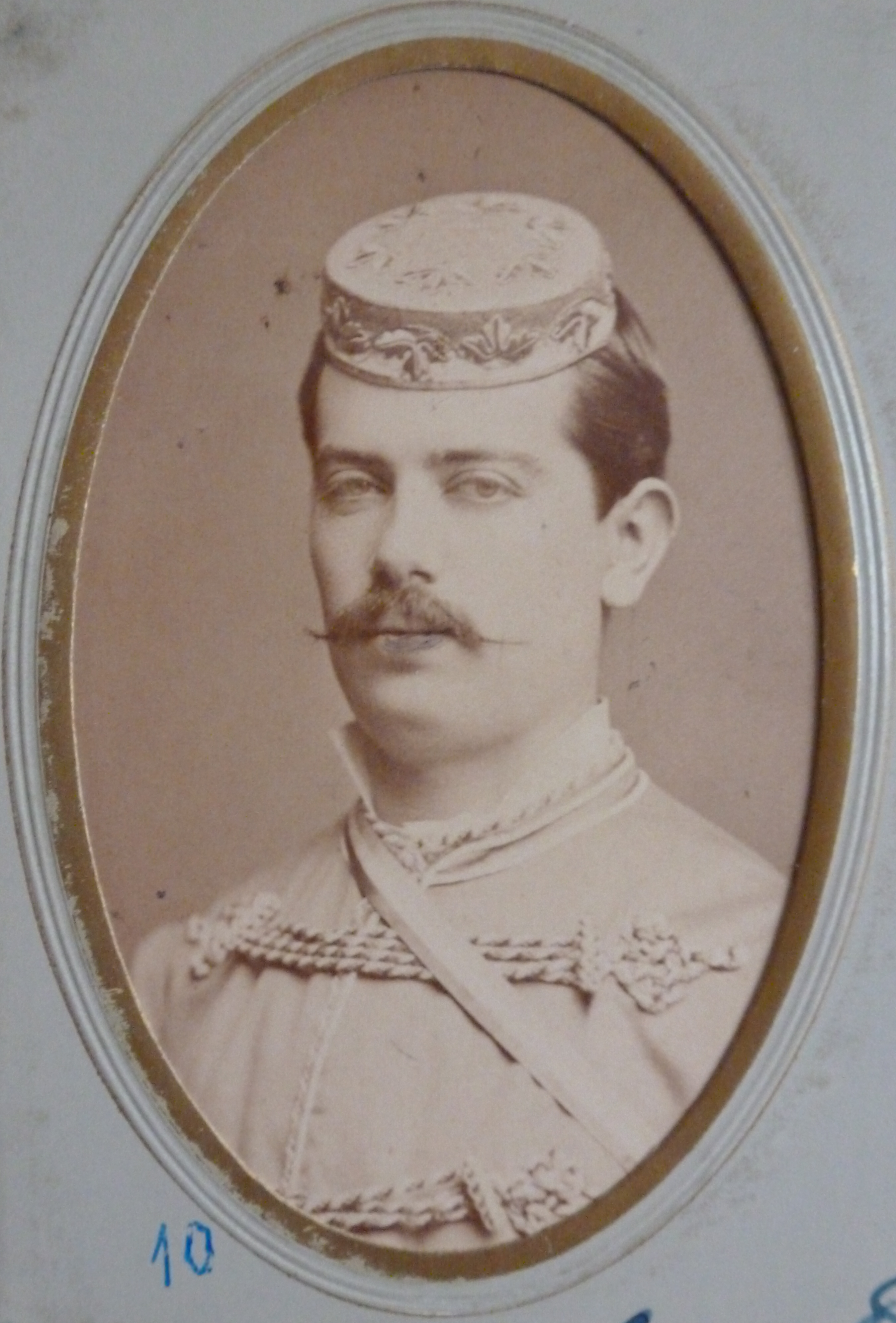 Porträtfoto von Hans Koch